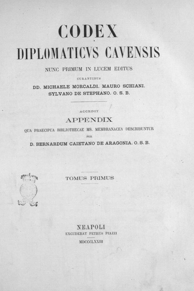 Frontespizio